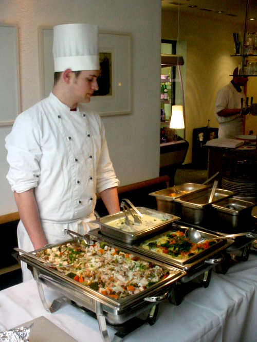 Warme Gerichte beim Brunch